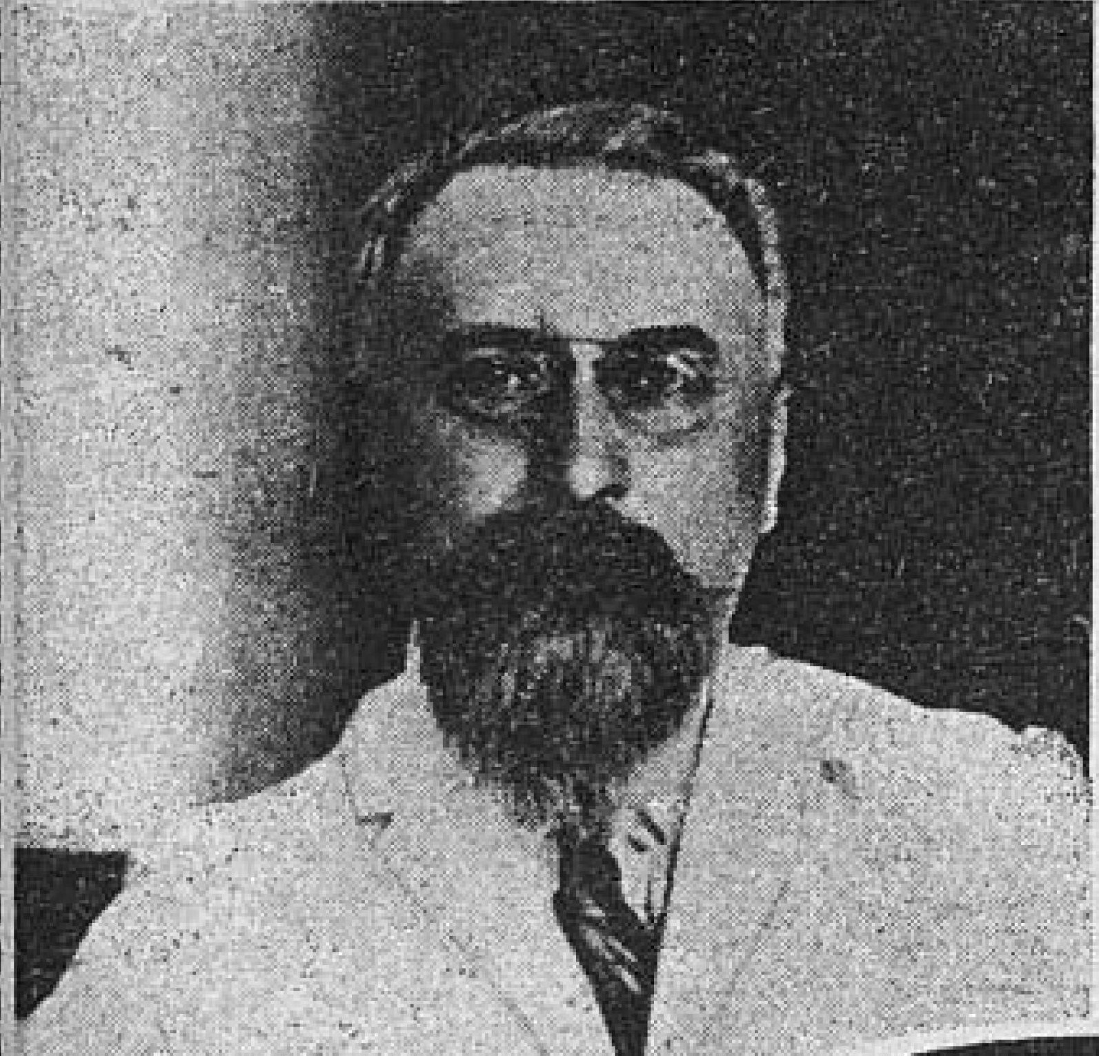 Đông Dương ngày xưa và ngày nay: Pierre Pasquier, Toàn quyền Pháp ở Đông Dương